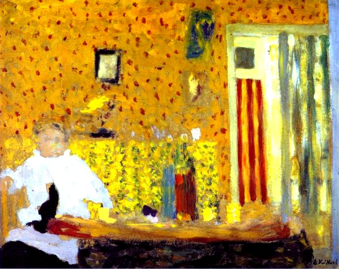 Après le repas 28x36 cm, huile sur carton